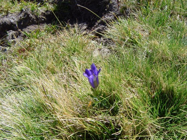 Gentiana pneumonanthe. La Serrota (2294 m.) Ávila, España